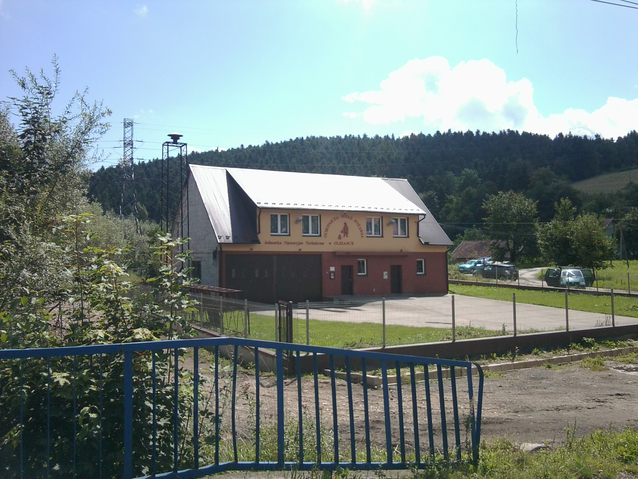 Remiza OSP w Olszance(województwo małopolskie)